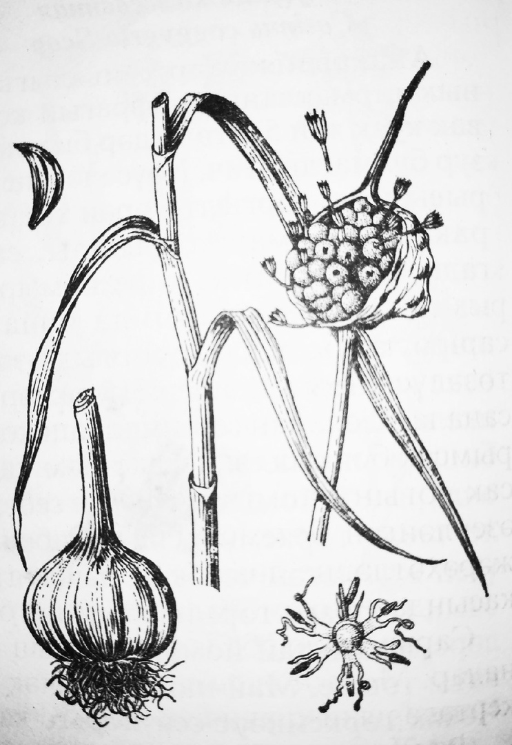 Татарча/tatarça: сарымсак.2019.